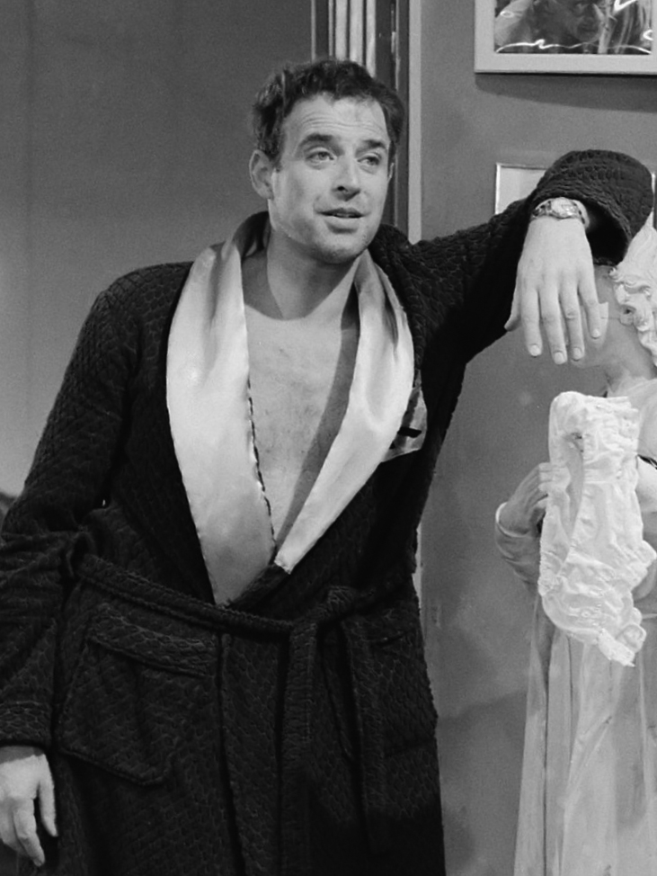 Televisiespel "Vooravond in Naherfst" . Leo de Hartogh 23 november 1961